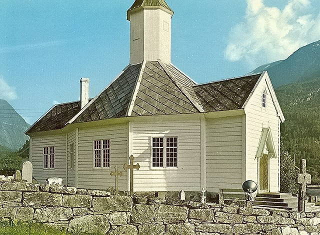 Loen kirke